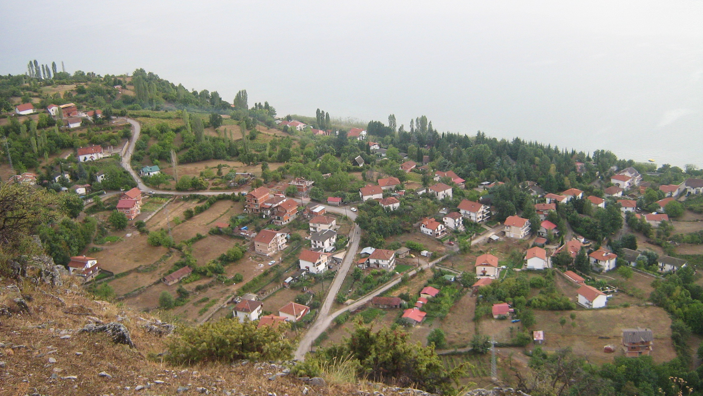 Населба Елешец Лиценцирање